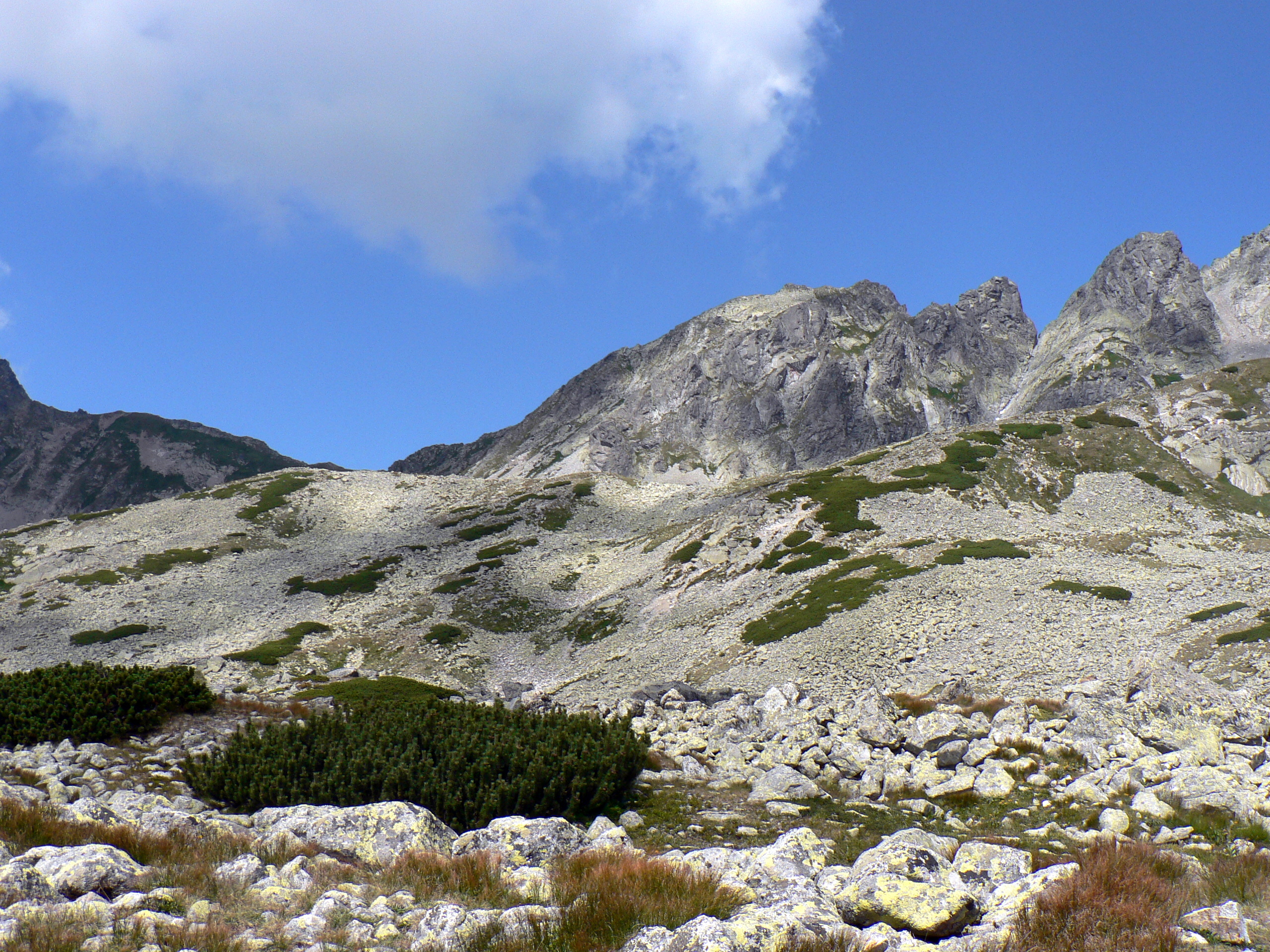 Świstowa Przełęcz, Graniasta Turnia, Rówienkowa Turnia i Krzesany Róg